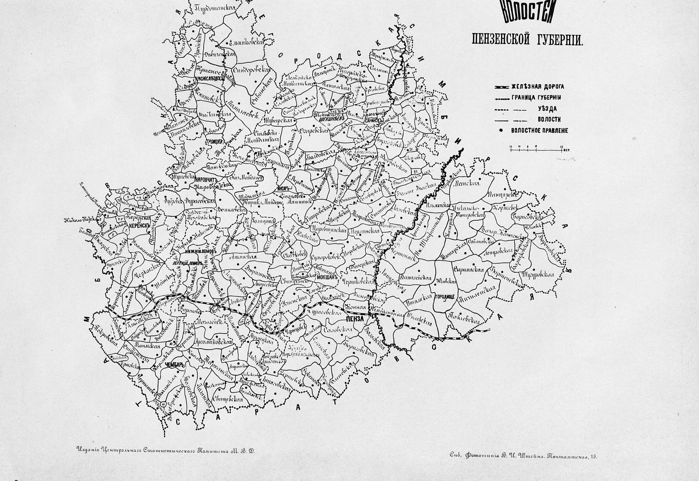 Карта волостей Пензенской губернии